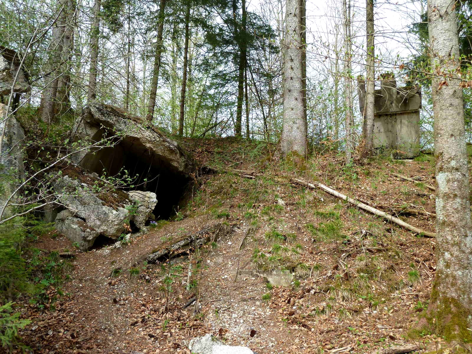 Reste der Munitionsfabrik Geretsried